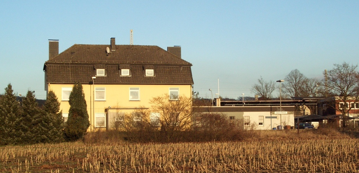 Lengericher Personenbahnhof (Lengerich-Hohne Pbf) der Teutoburger Wald-Eisenbahn (TWE)